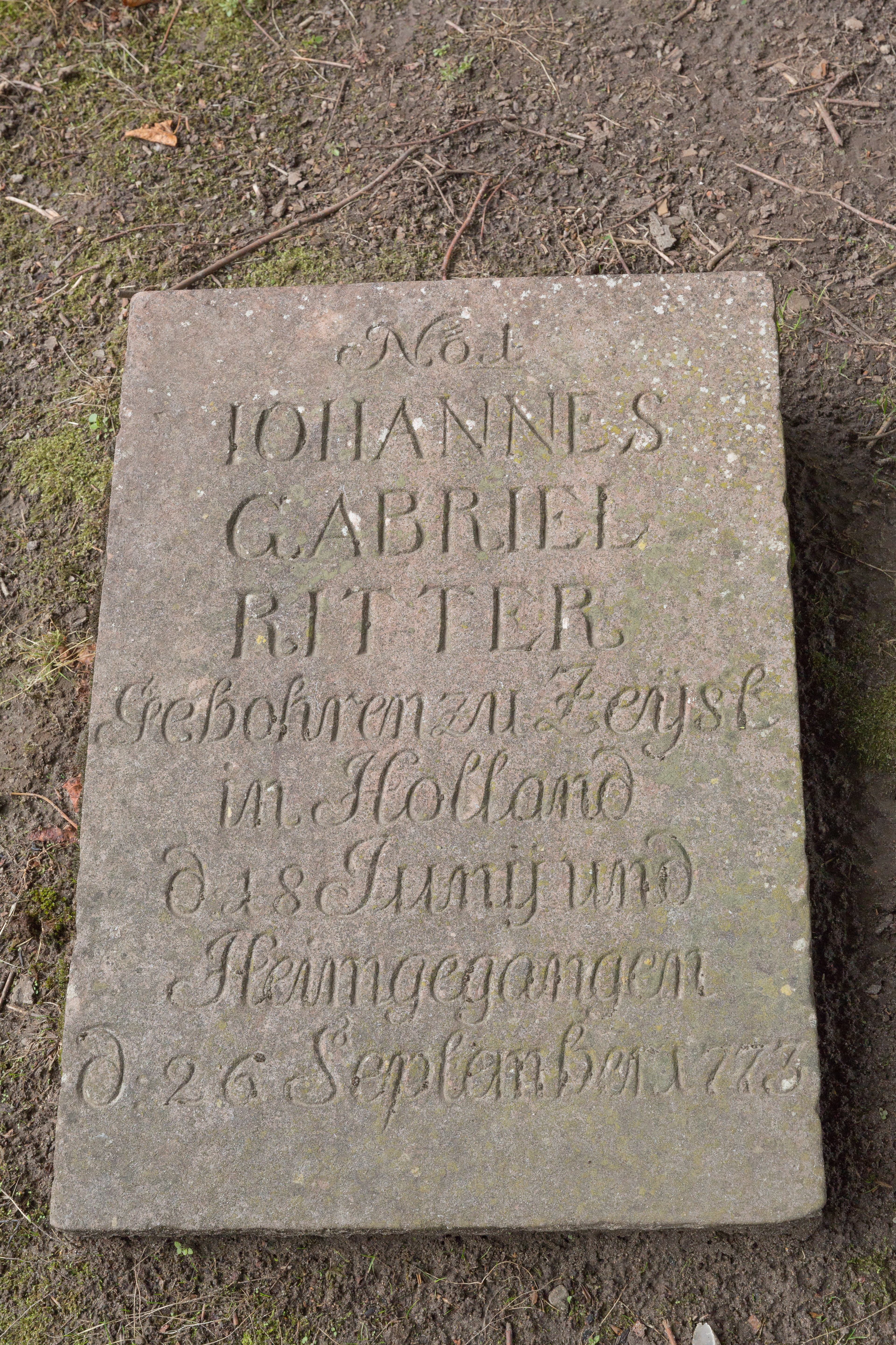 første gravsted fra Brødremenigheden på Gudsageren